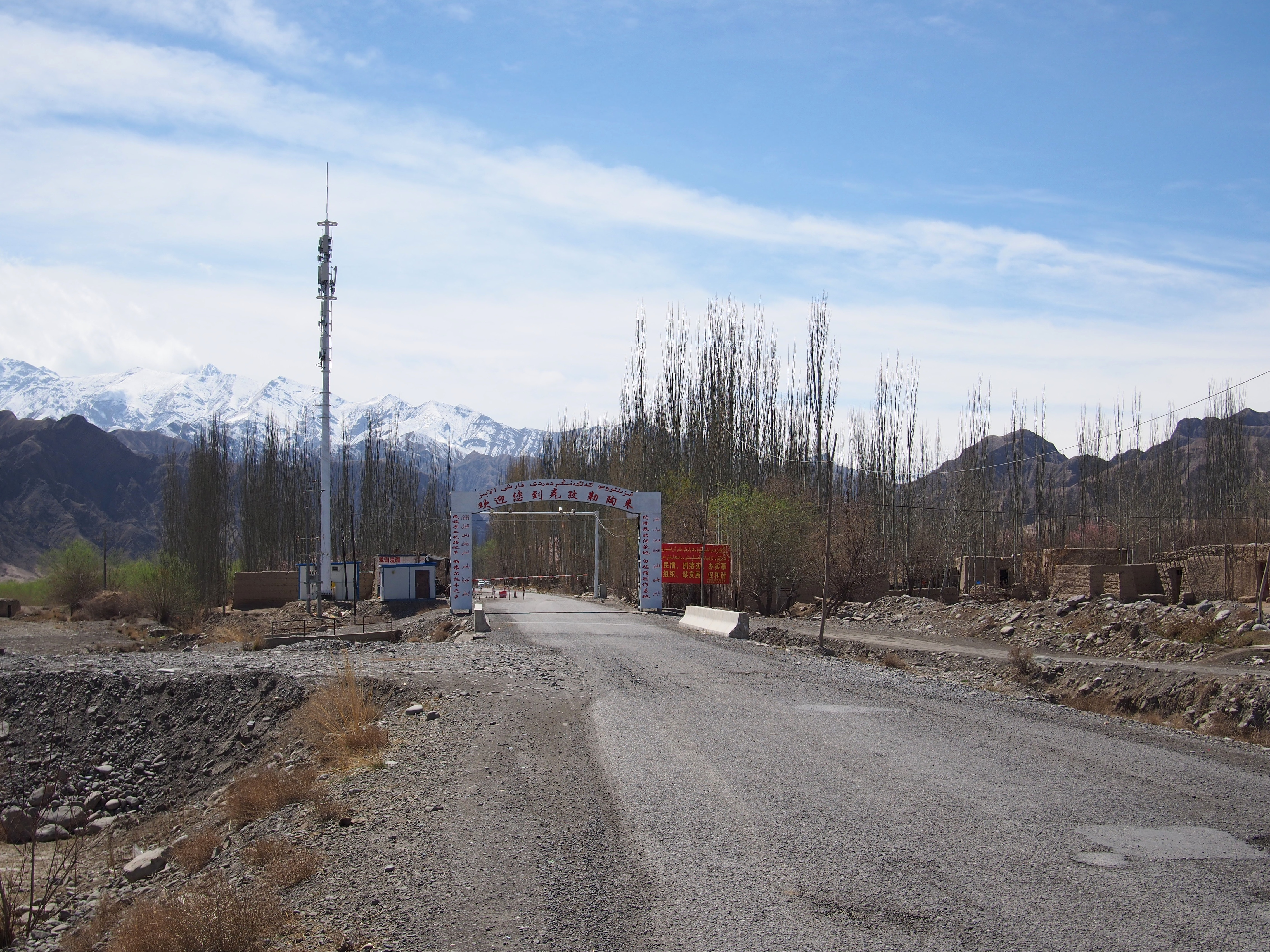 欢迎您到克孜勒陶来 - Welcome to Kizilto - 2015.04